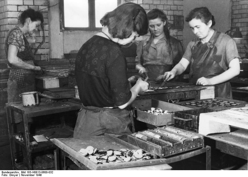 Rathenow, Produktion von Augengläsern Zentralbild/Dreyer November 1948. Die Rathenower Optischen Werke, ROW, in Rathenow. U.B.z.: In der Kitterei werden die Augengläser für das Schleifen und Polieren vorbereitet.